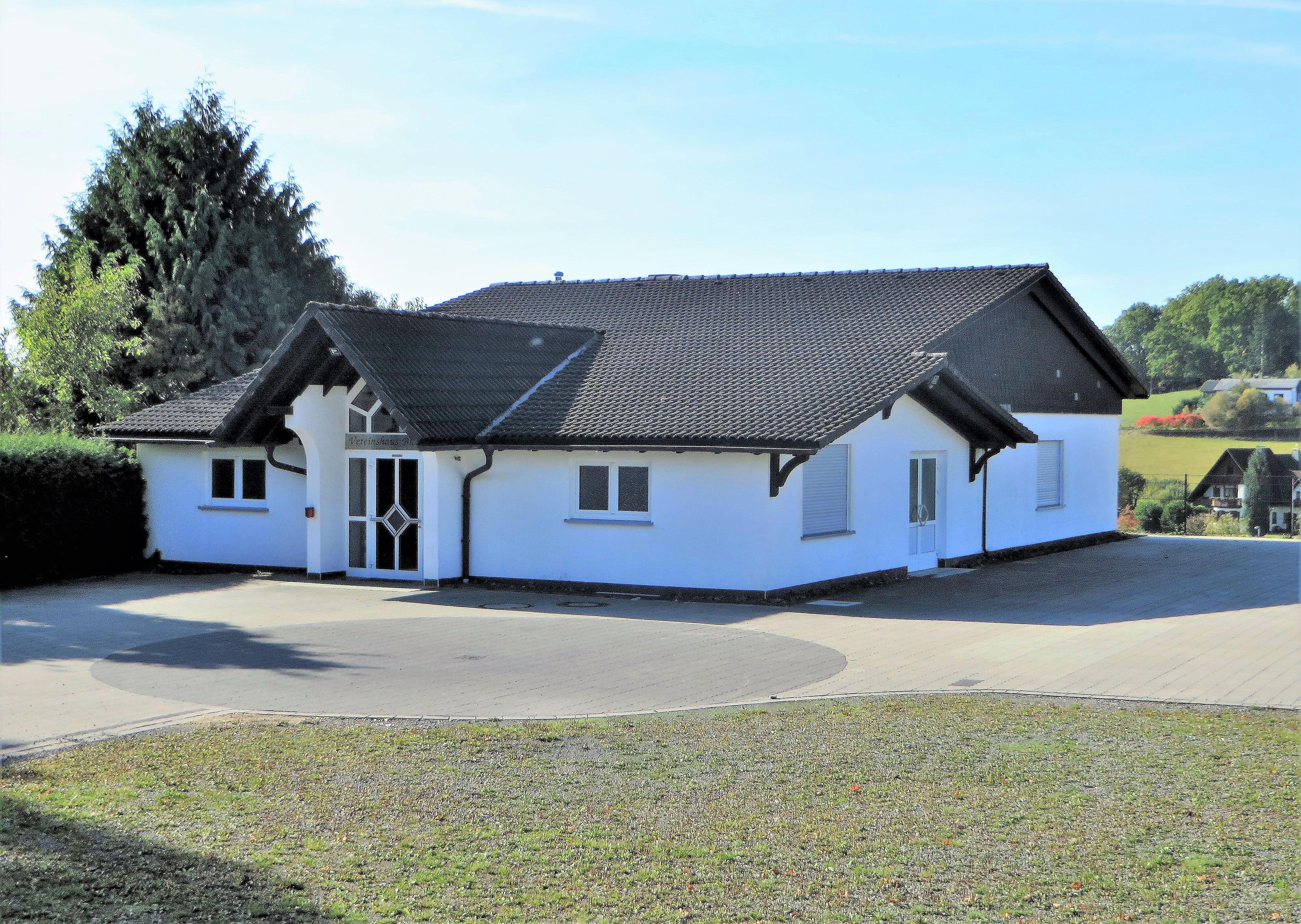 Vereinshaus Biekhofen auf dem Schützenplatz Hubertusstraße.